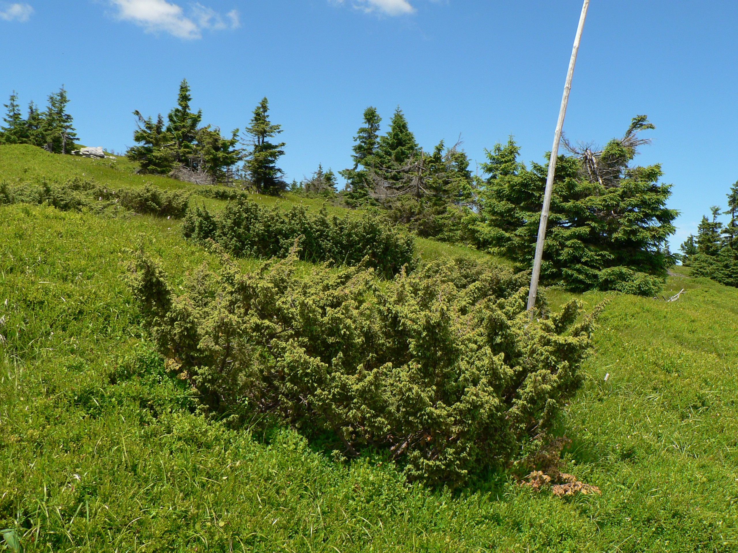 Jalovec ve vrcholové oblasti Břidličné v Hrubém Jeseníku.